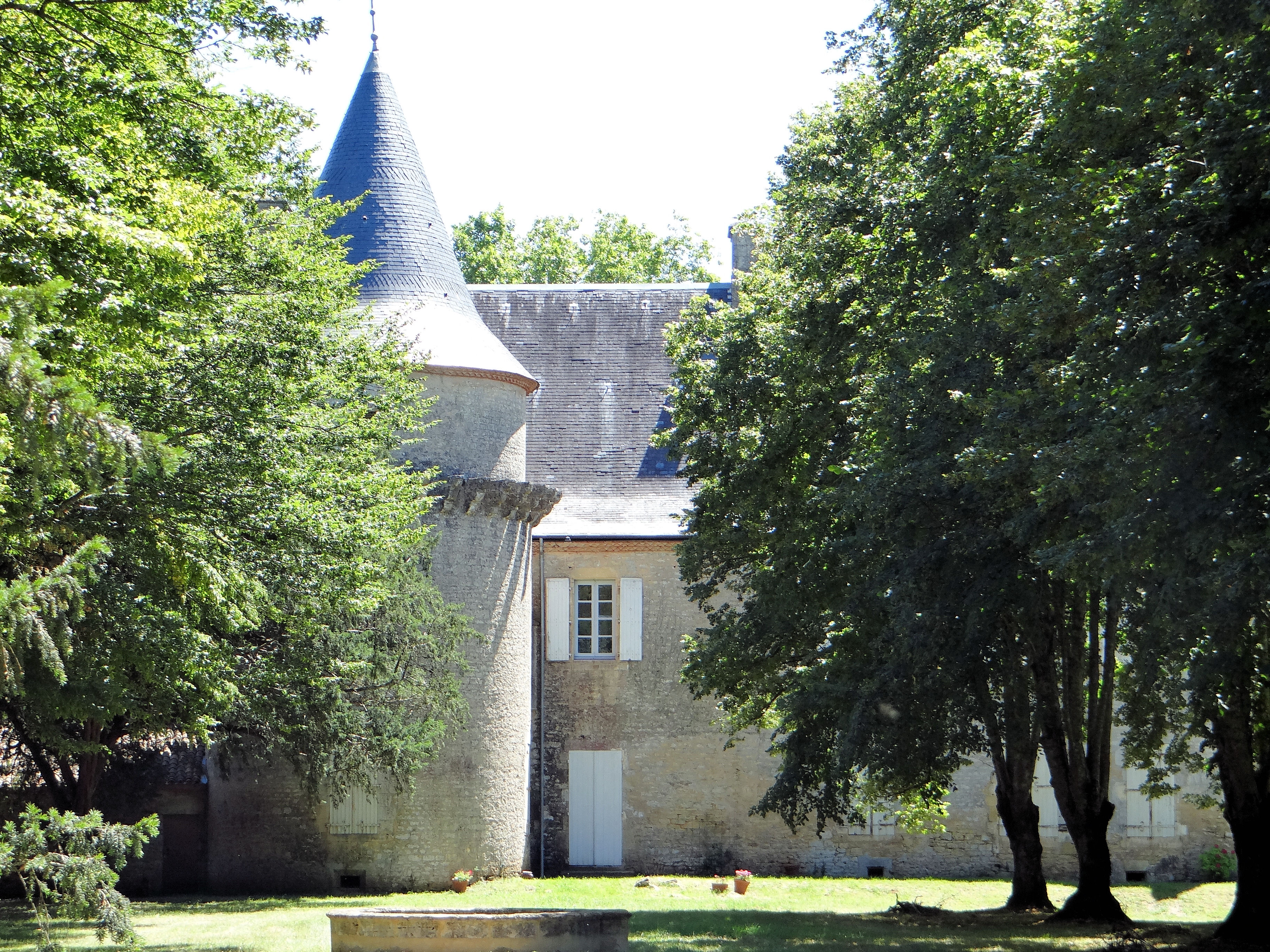 Saint-Cernin-de-l'Herm - Château de Sineuil - Façae côté nord